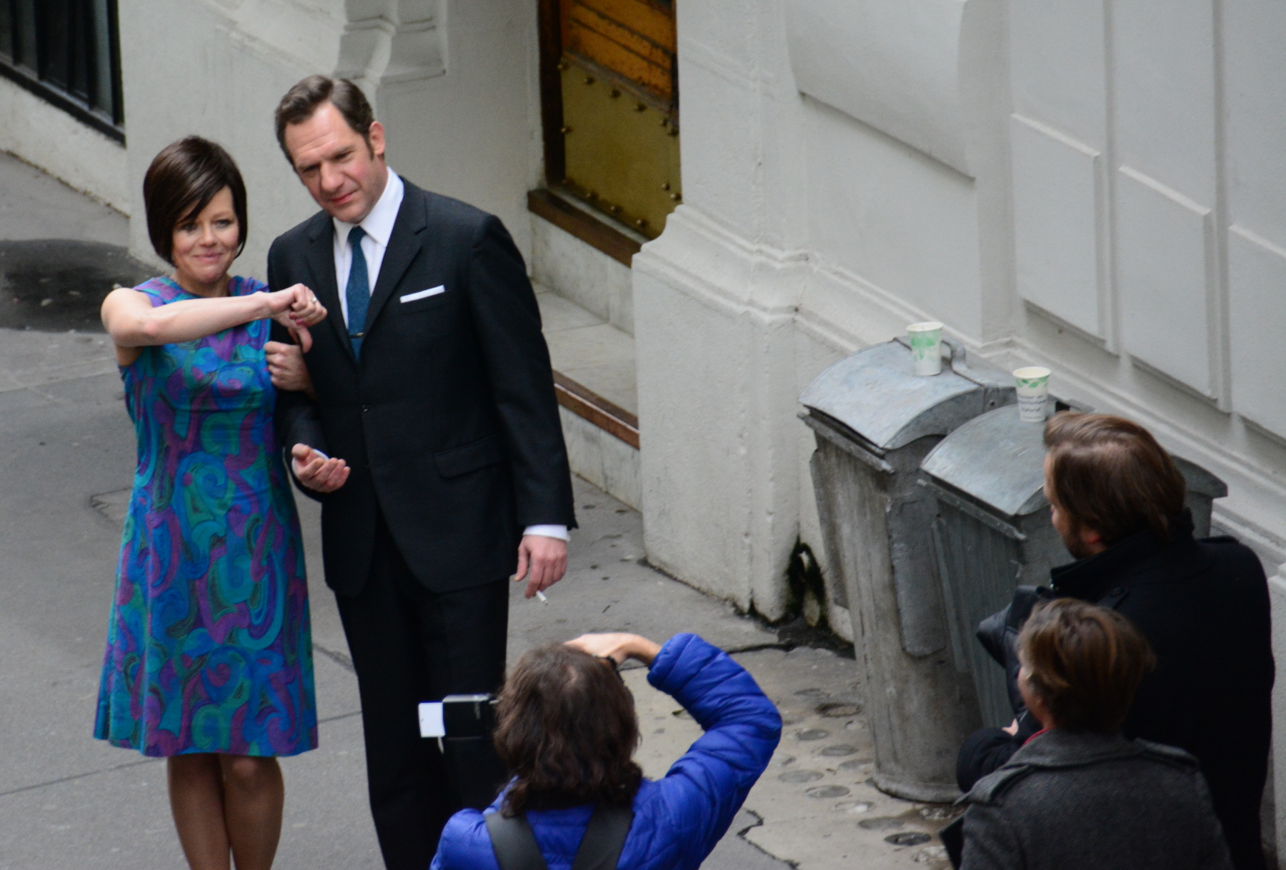 Eva Spreitzhofer und Johannes Zeiler bei Dreharbeiten für den Film „Deckname: Holec“ am Tiefen Graben in Wien.